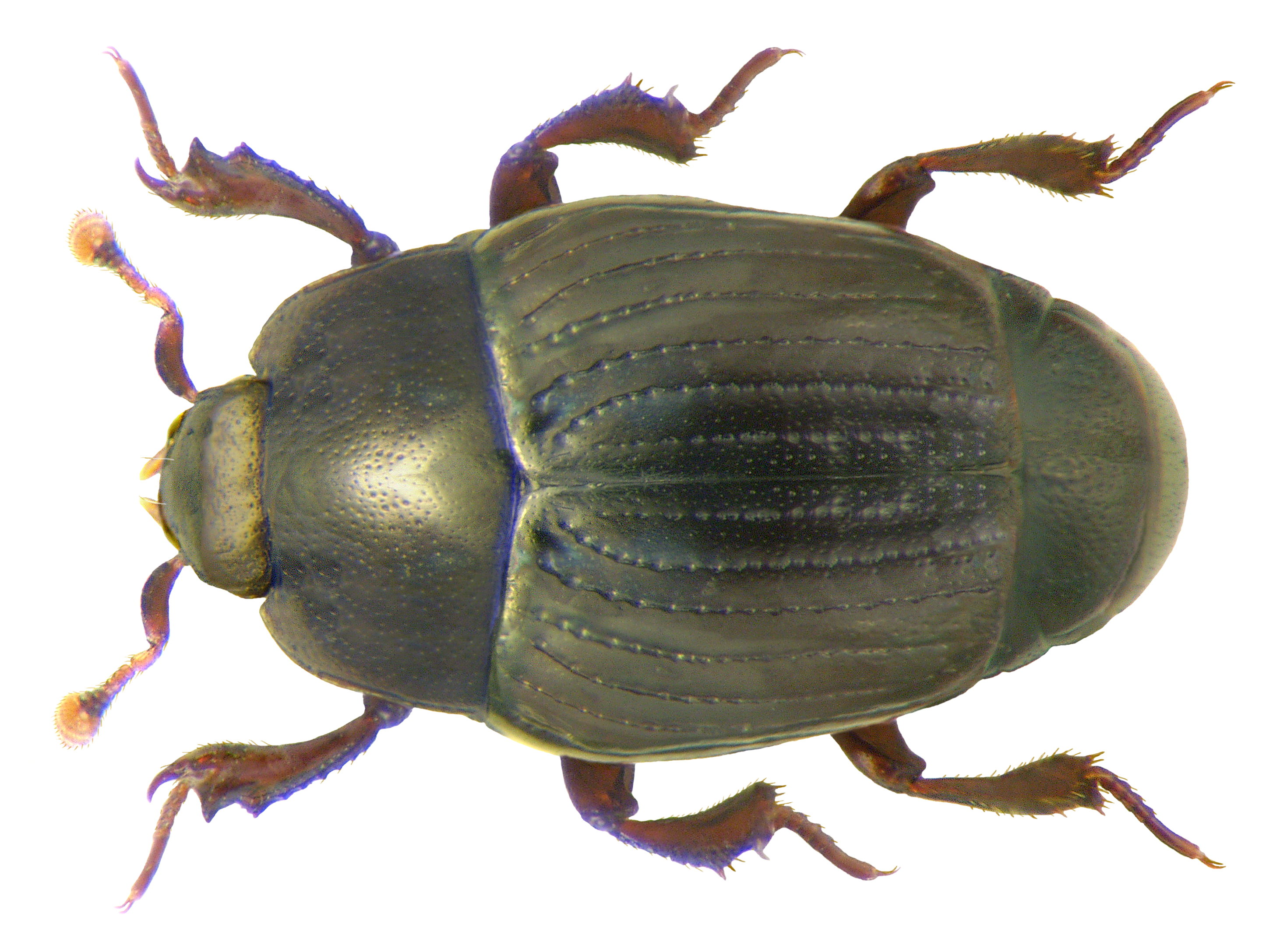 Familie: Histeridae Grösse: 2-2,5 mm Verbreitung: Kosmopolit Ökologie: an tierischem und pflanzlichem Material Fundort: Germania, Bayern, Oberfranken, Schwarzenbach a. Wald leg.det. U.Schmidt, 2004 Foto: U.Schmidt, 2008